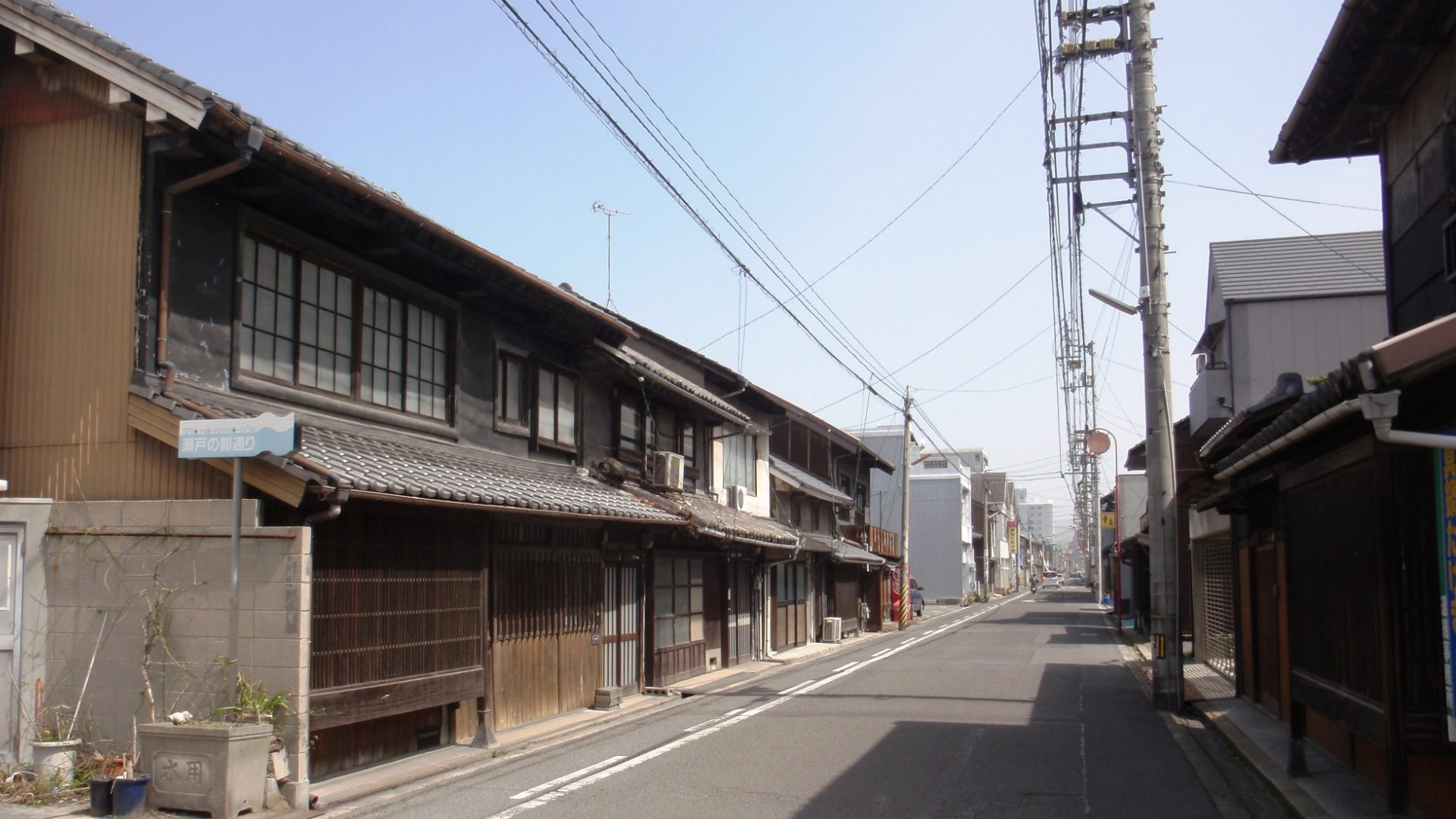 旧丸亀街道の香川県高松市扇町部分。江戸時代からの町屋が残る。